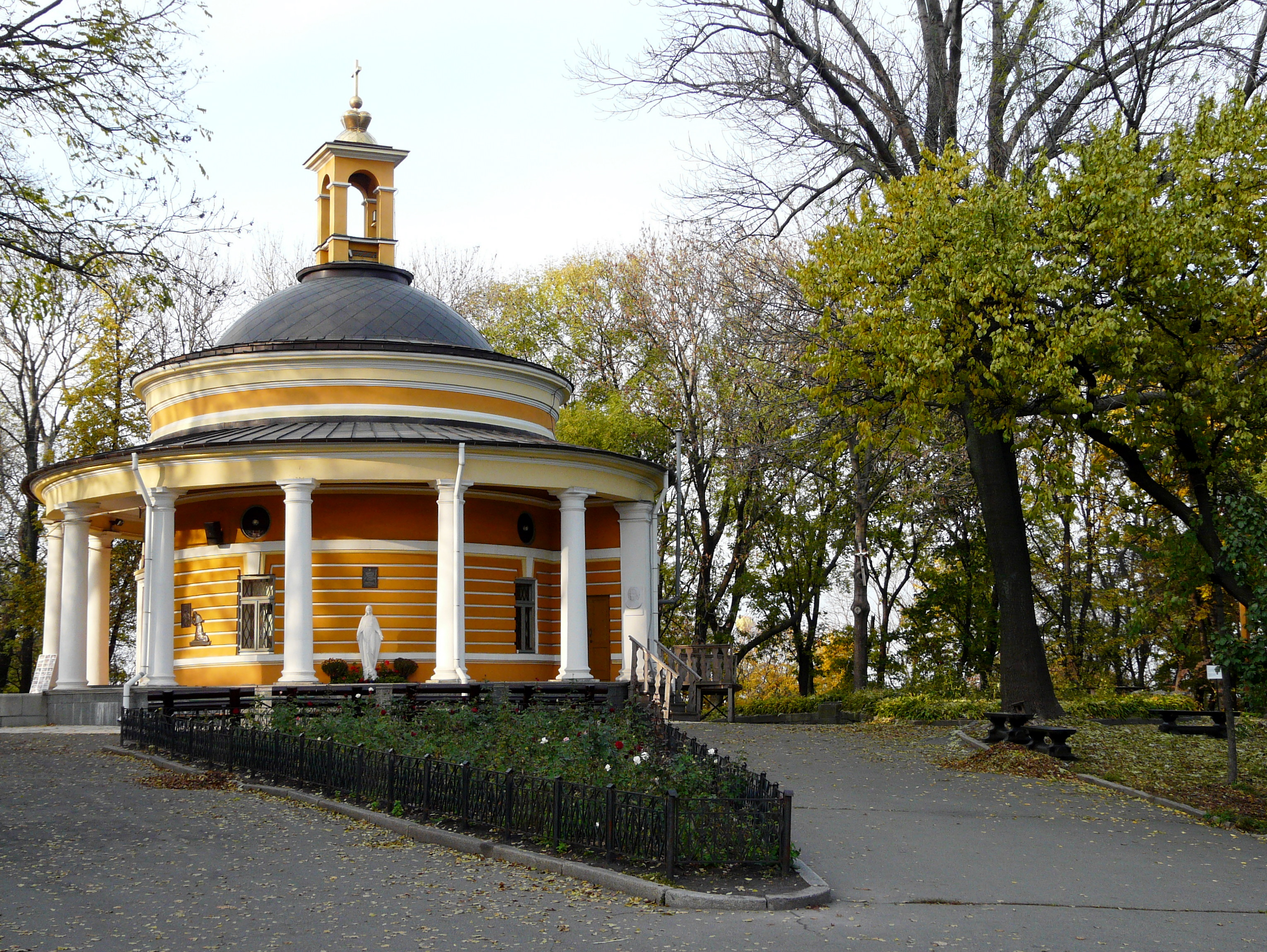 Церква Миколи на Аскольдовій могилі (ротонда), Київ, Паркова дорога